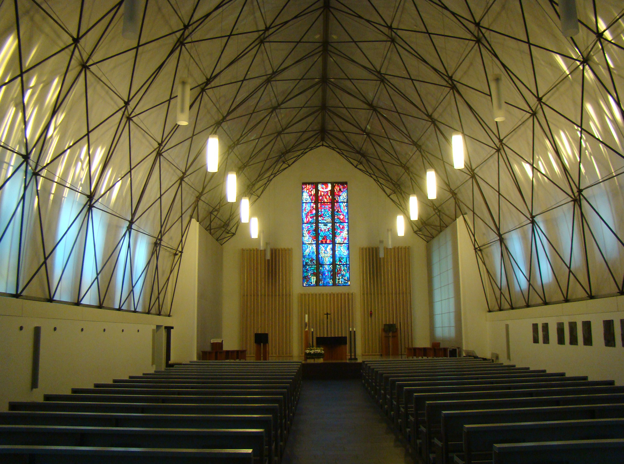 Augustinuskirche in Heilbronn